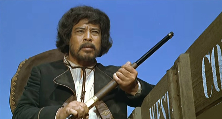 Screenshot dal film Una colt in pugno al diavolo (1967) di Sergio Bergonzelli